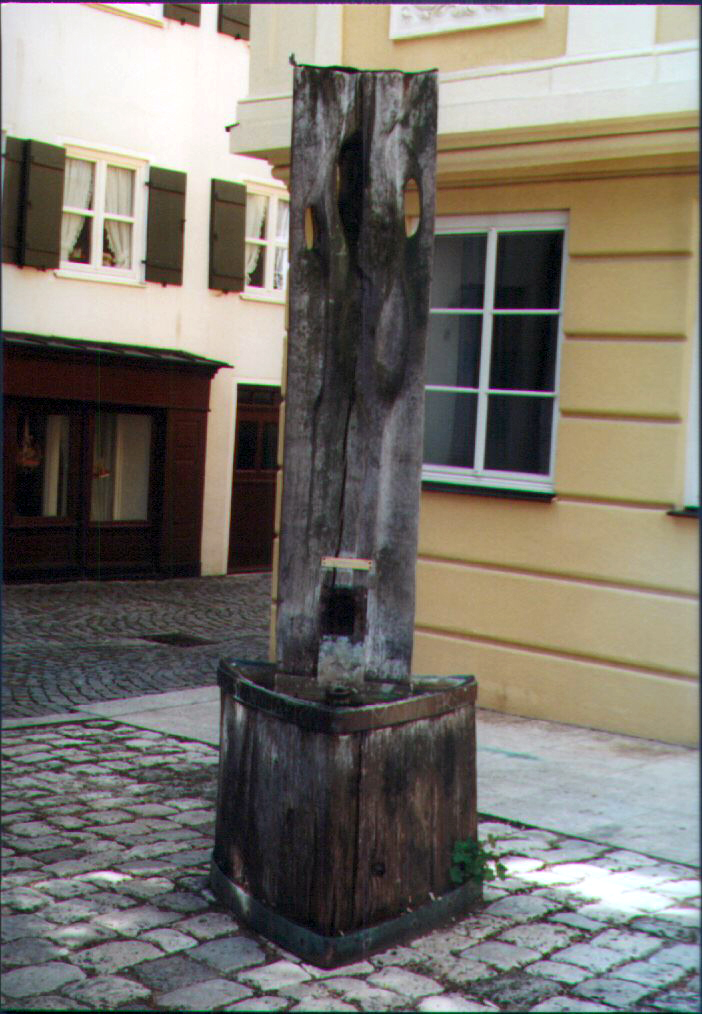 Maria-Holl-Brunnen in Nördlingen am Weinmarkt. Dies ist ein 1966 errichtetes Denkmal für Maria Holl, die 1593 als angebliche Hexe fast ein Jahr lang inhaftiert wurde. Als sie nach 62 Folterungen immer noch kein Geständnis abgelegt hatte, wurde sie wieder freigelassen. Inschrift Der standhaften Maria Holl zum Gedenken